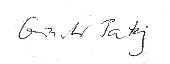 Günther Patzig. Signatur seines Briefes an mich vom 13.10.1994.